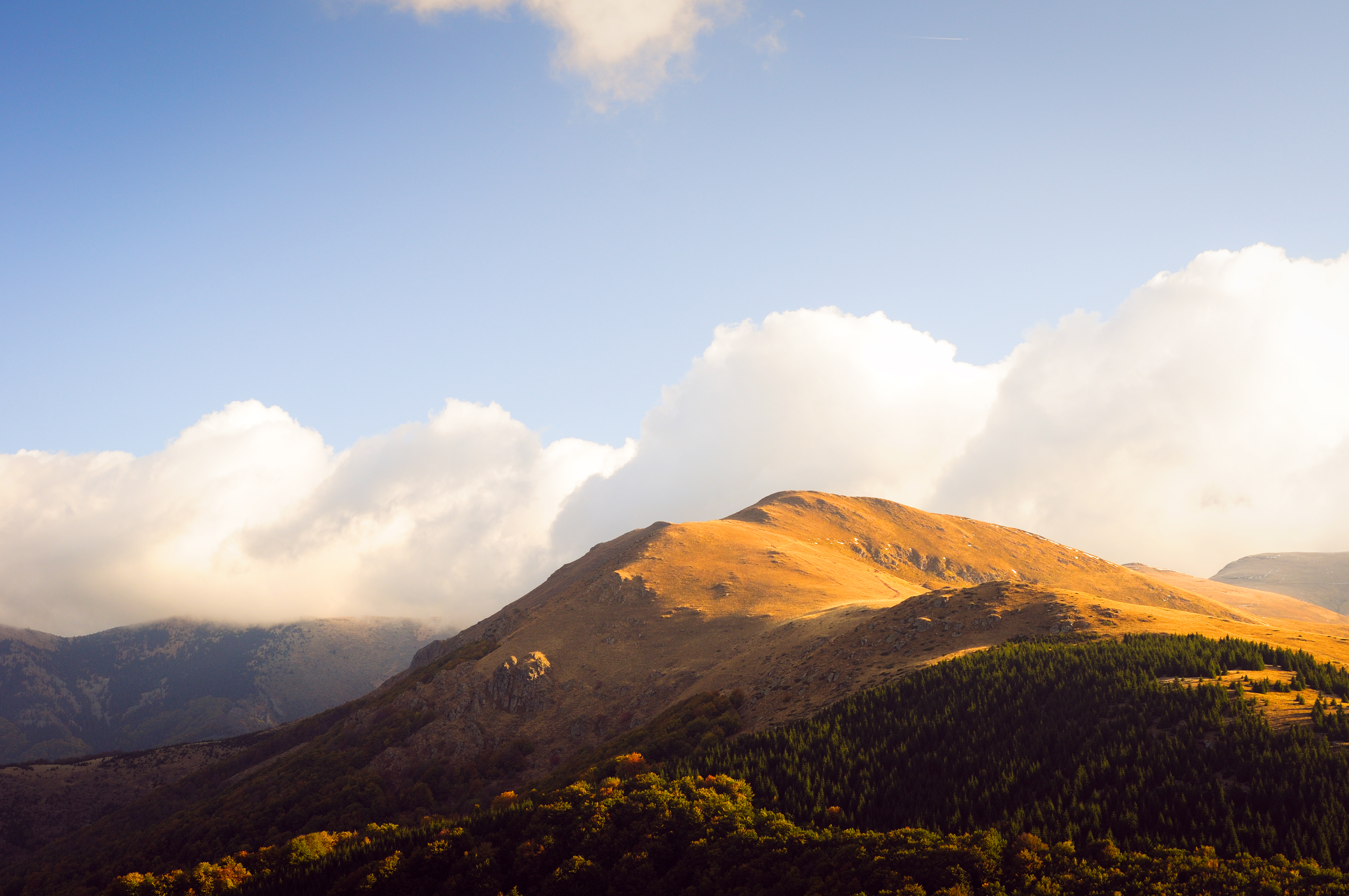 Ово је фотографија заштићеног природног добра у Србији под шифром: ПП16This is a a photo of a natural area in Serbia with ID: ПП16 Srpski (latinica): ПП16 Парк природе Стара планина